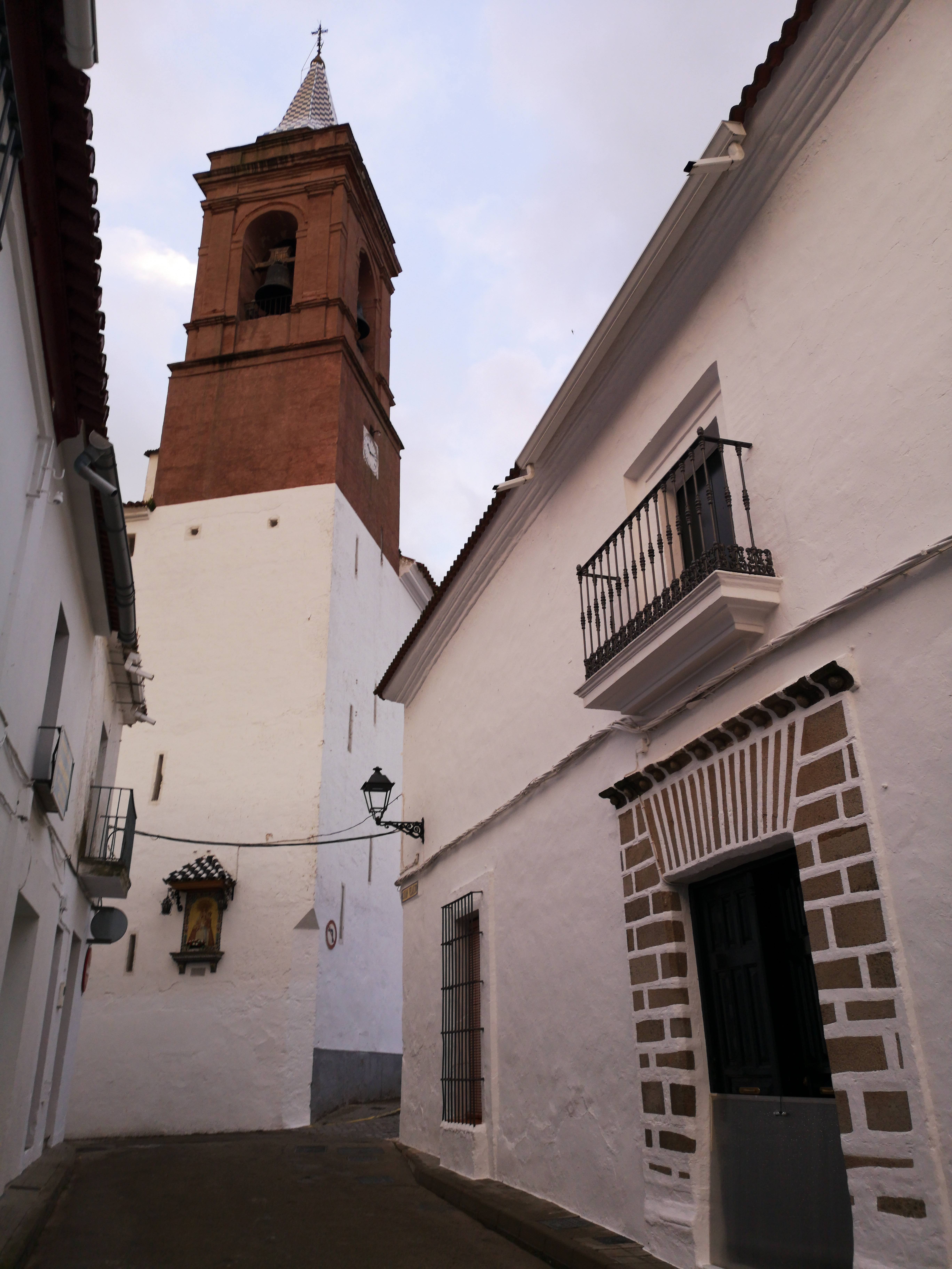 Vista de la torre de la Iglesia de San Andres Apostol de Encinasola, Huelva